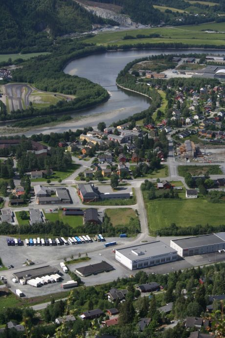 Orkanger